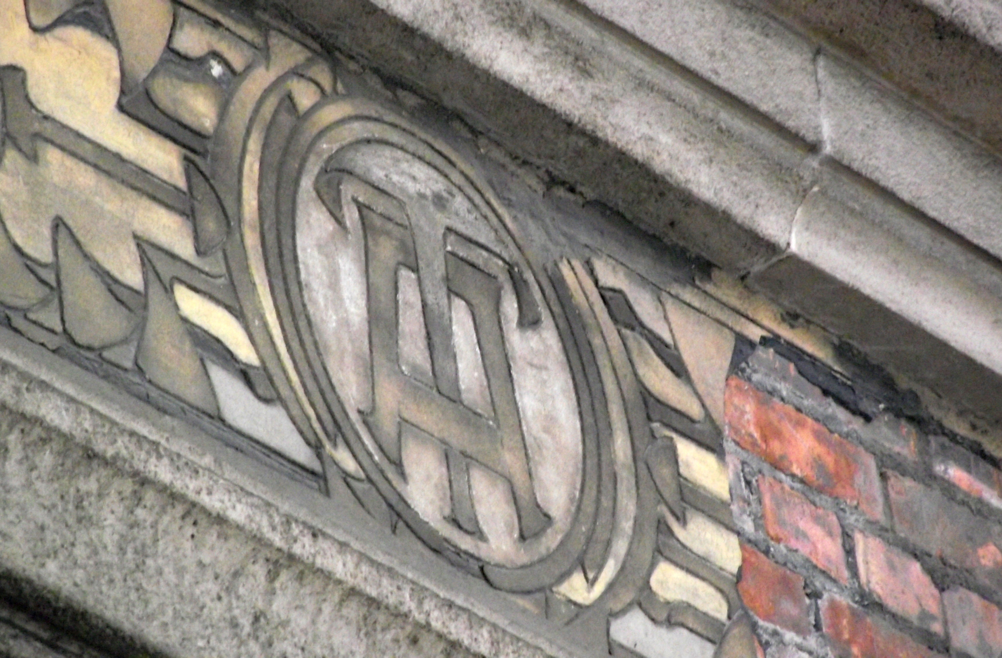 Vermoedelijk logo van de Tramways d'Anvers op een stelplaats gevel aan de Draakplaats in Antwerpen.